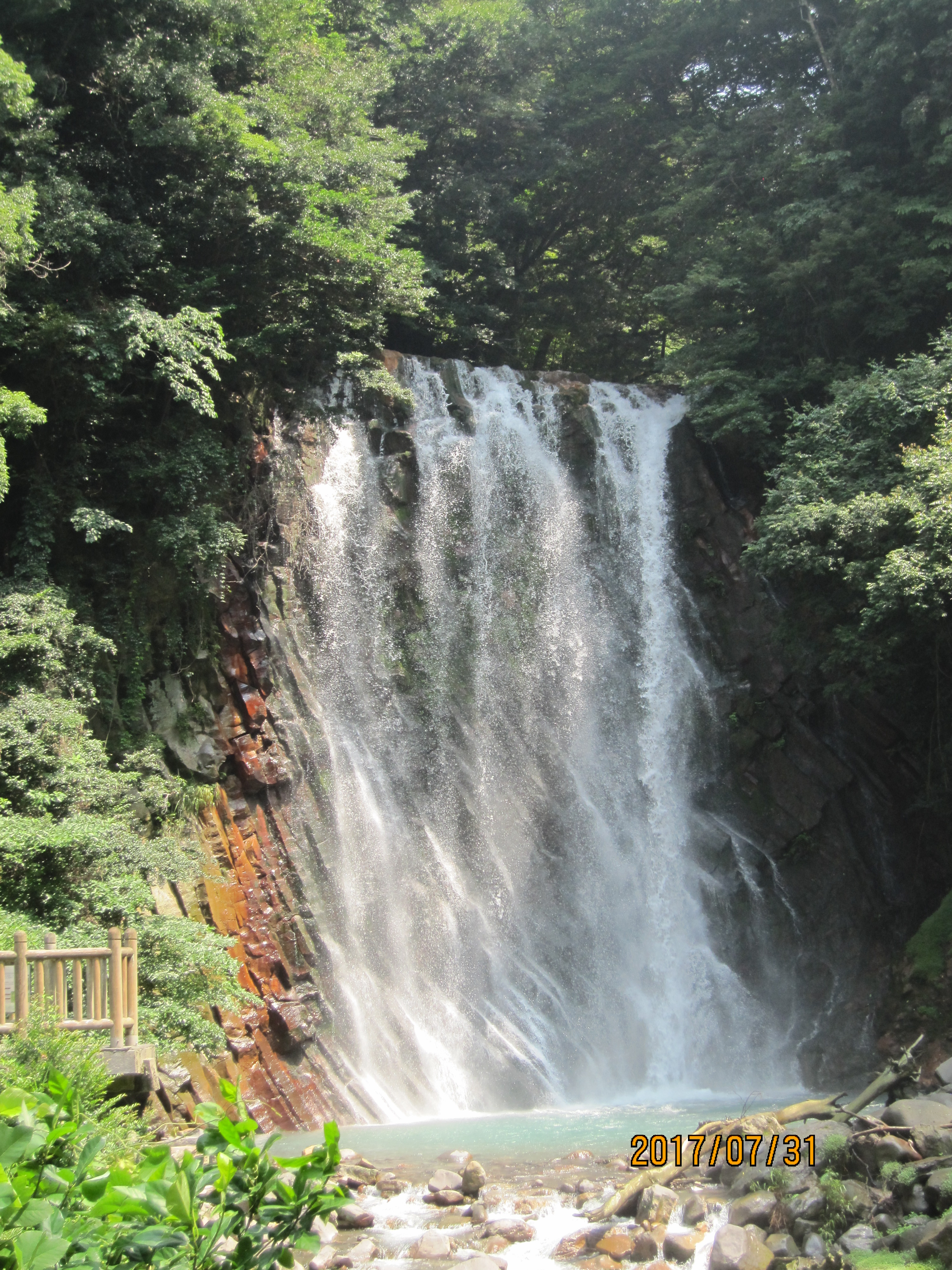 丸尾滝の写真